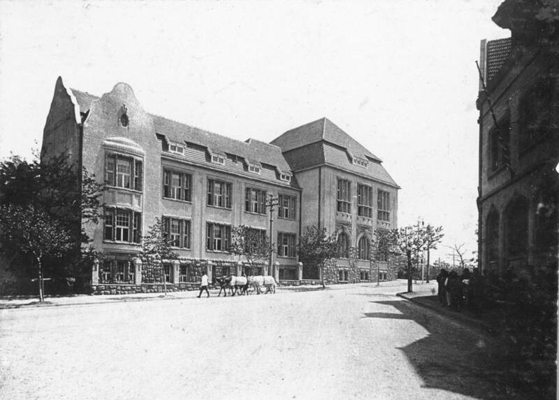 China, Tsingtau, Albert-Straße, Gerichtsgebäude（胶澳帝国法院旧址，南面） China, Tsingtau, Gerichtsgebäude Albert-Strassein Tsingtau, erbaut 1912-14.